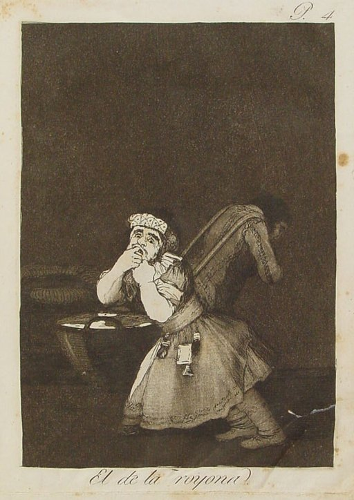 Capricho nº 4: El de la Rollona de Goya, serie Los Caprichos